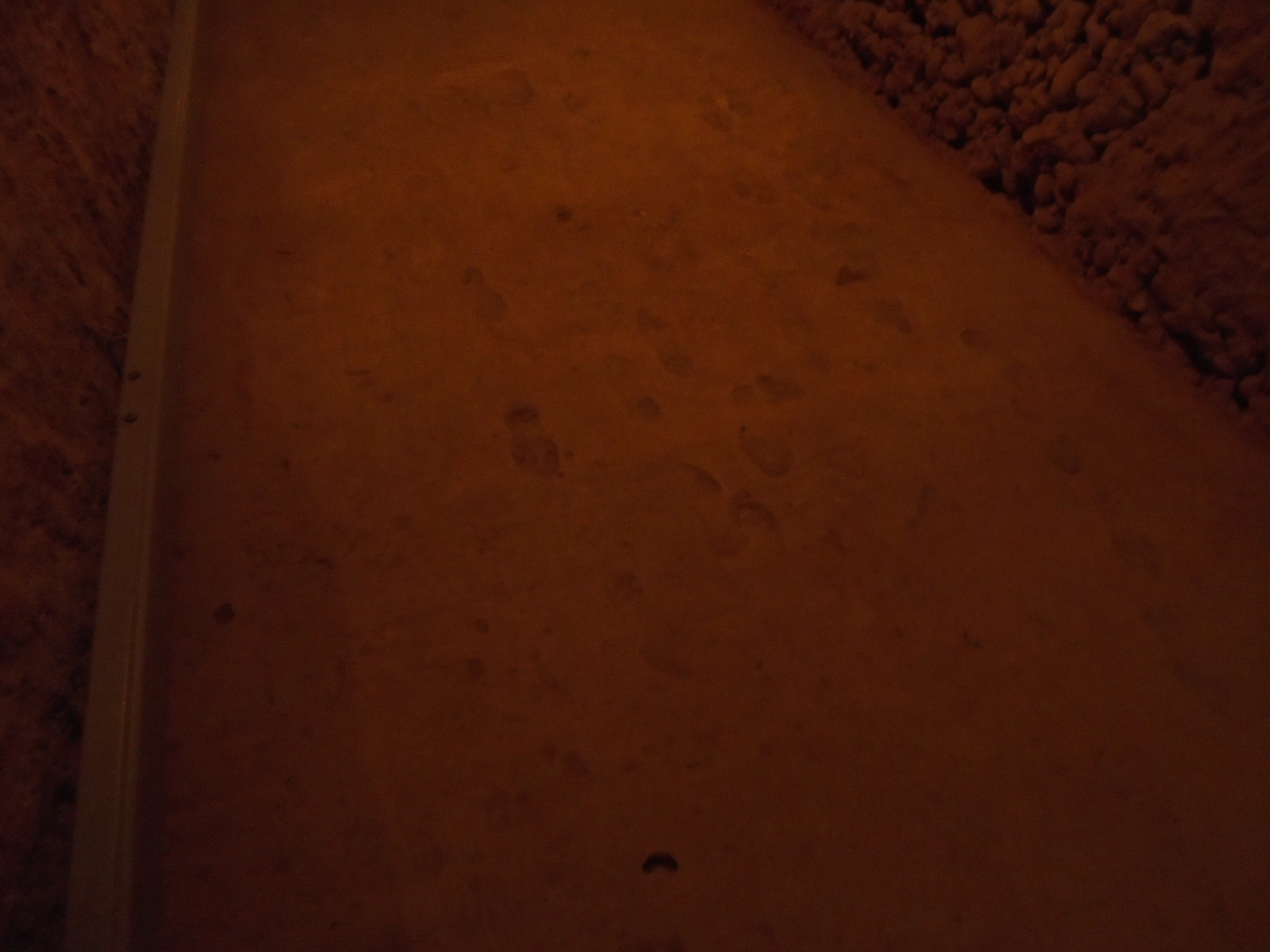 Tram de petjades impreses mentre el formigó era humit, l'any 1938.